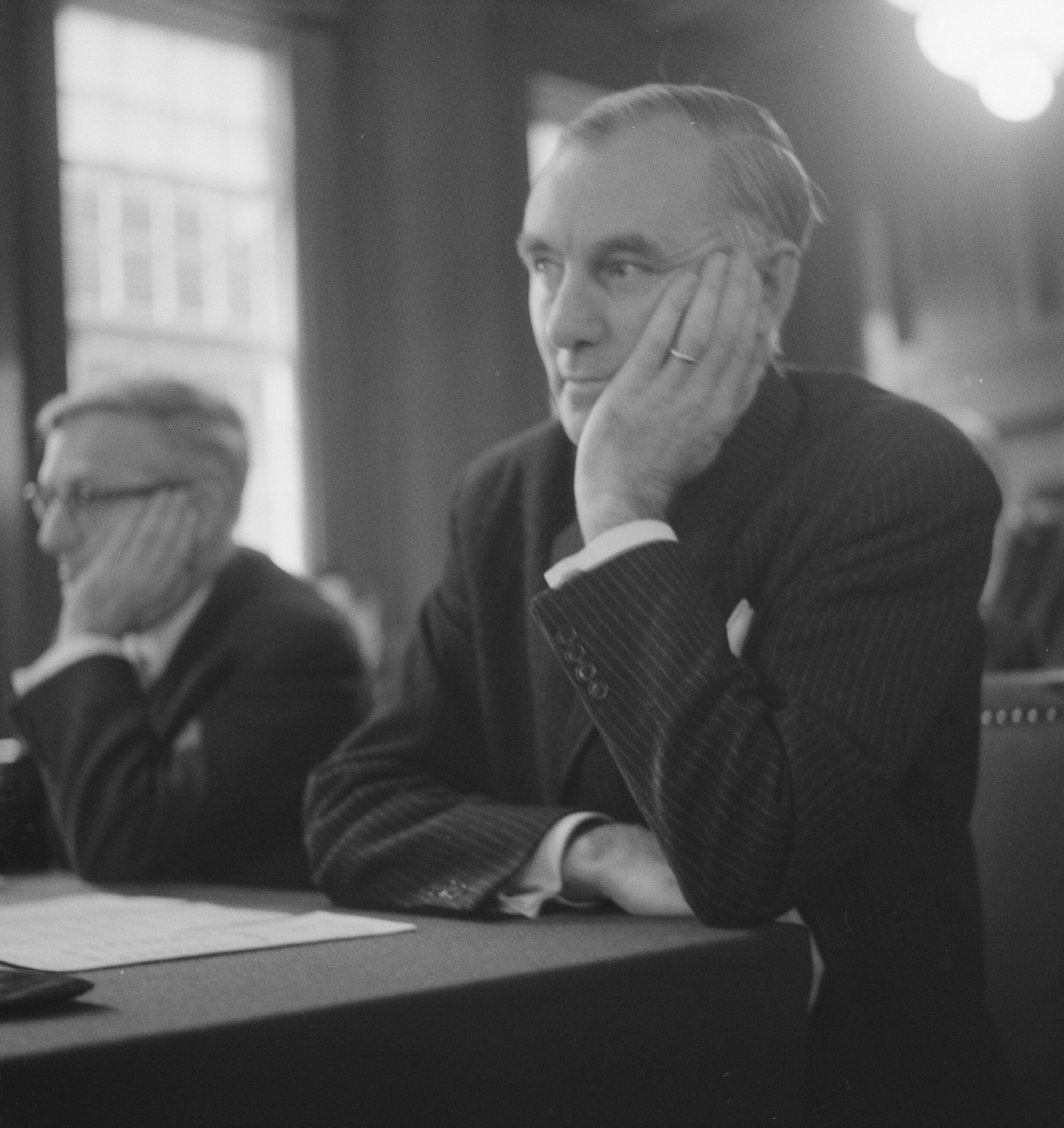 Collectie / Archief : Fotocollectie Anefo Reportage / Serie : [ onbekend ] Beschrijving : Behandeling "Stadhuisontwerp" in de gemeenteraad. Ir. Vegter Datum : 18 oktober 1961 Trefwoorden : behandelingen, gemeenteraden Fotograaf : Nijs, Jac. de / Anefo Auteursrechthebbende : Nationaal Archief Materiaalsoort : Negatief (zwart/wit) Nummer archiefinventaris : bekijk toegang 2.24.01.03 Bestanddeelnummer : 913-0651